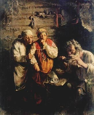 Знахарь. (У колдуна. Деревенский знахарь.) 1860